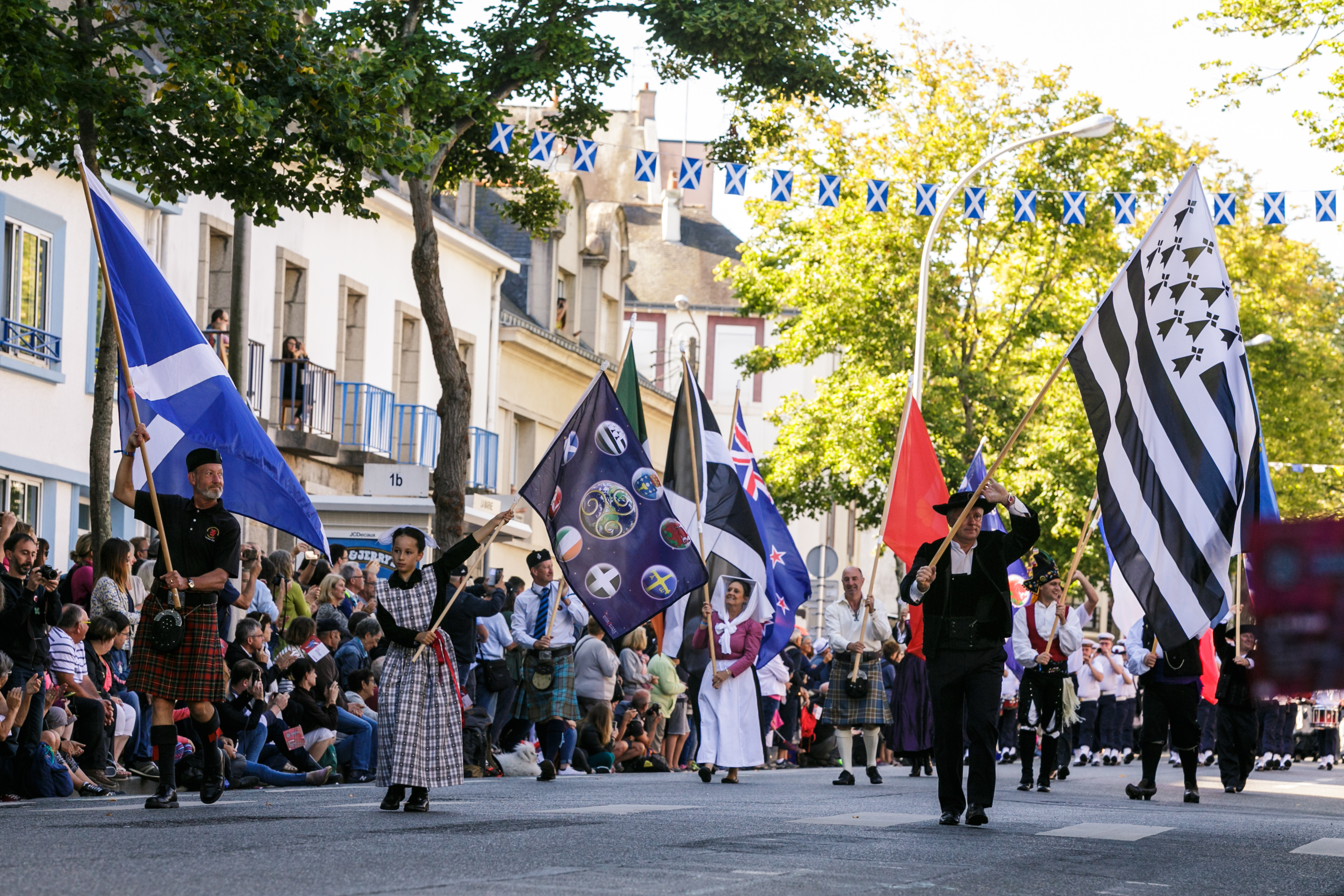 Festival Interceltique de Lorient 2017 - Grande parade des nations celtes - Drapeaux des Nations celtes